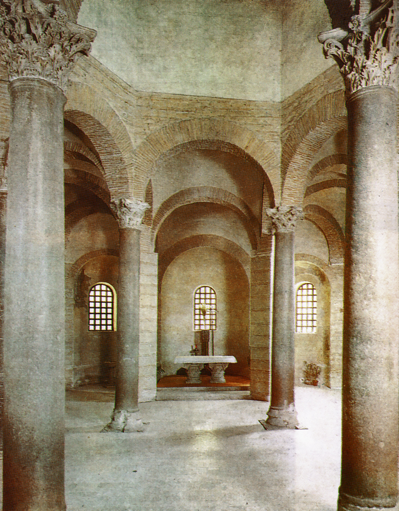 illustrazione in pd-italia da: aa.vv. magistra barbaritas, i barbari in italia, milano, libri scheiwiller 1984 Licensing Categoria:Immagini d'arte longobarda